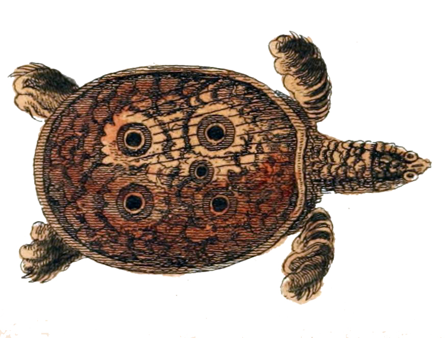 Nilssonia gangetica